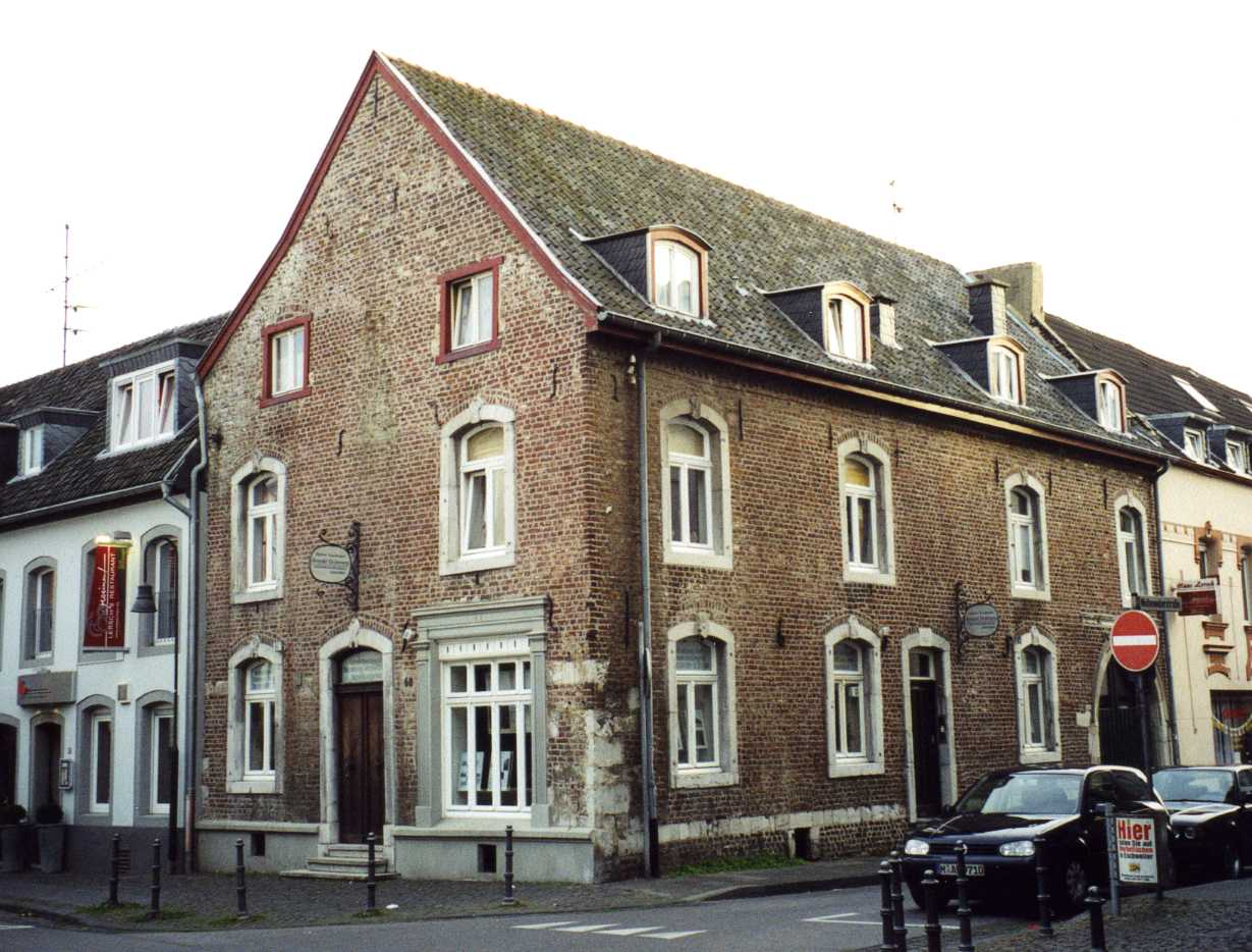 Schombart-Apotheke in der Eschweiler Altstadt Ecke Dürener Straße / Wollenweberstraße